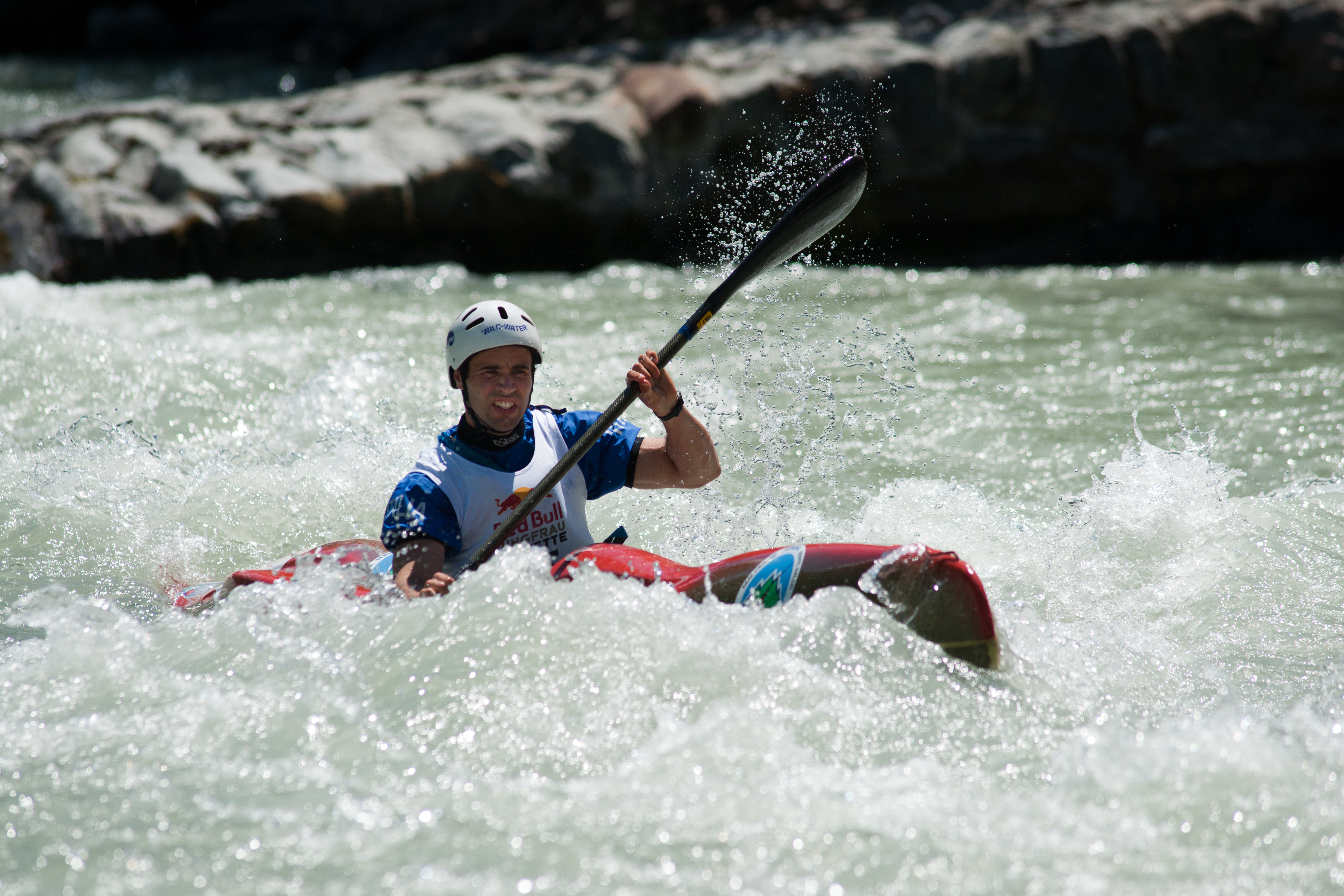 Canoë lors la Jungfrau Stafette 2010, Valais, Suisse